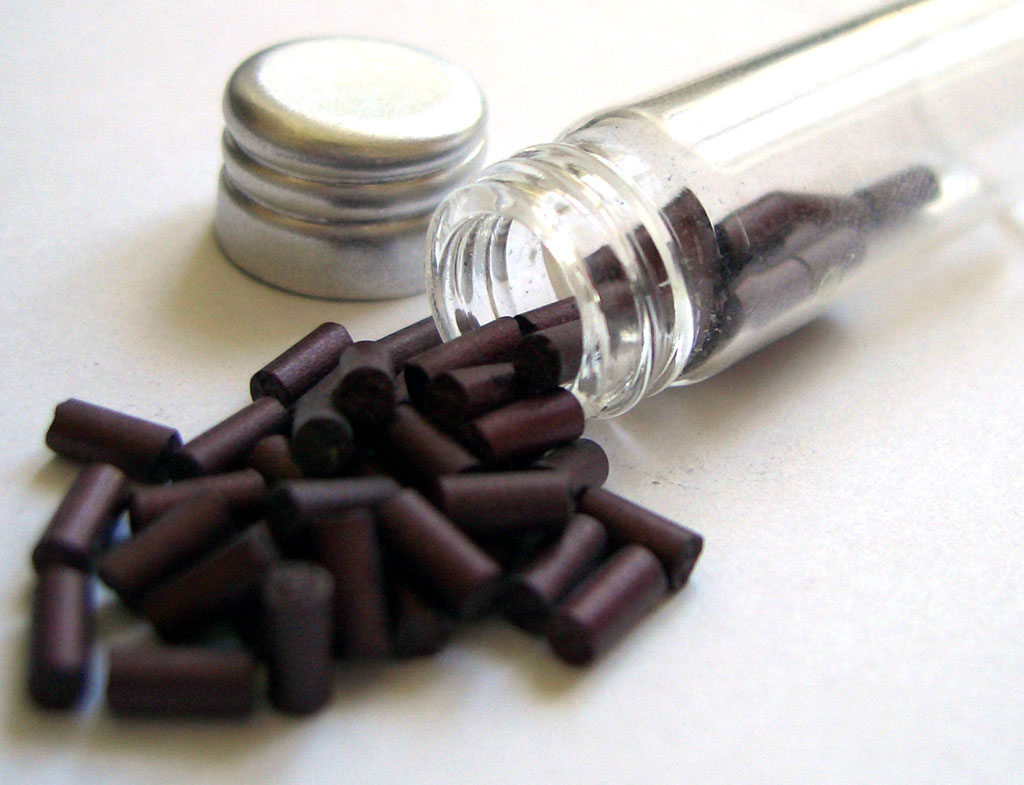 Ein Gläschen mit Cereisen-Zündsteinen